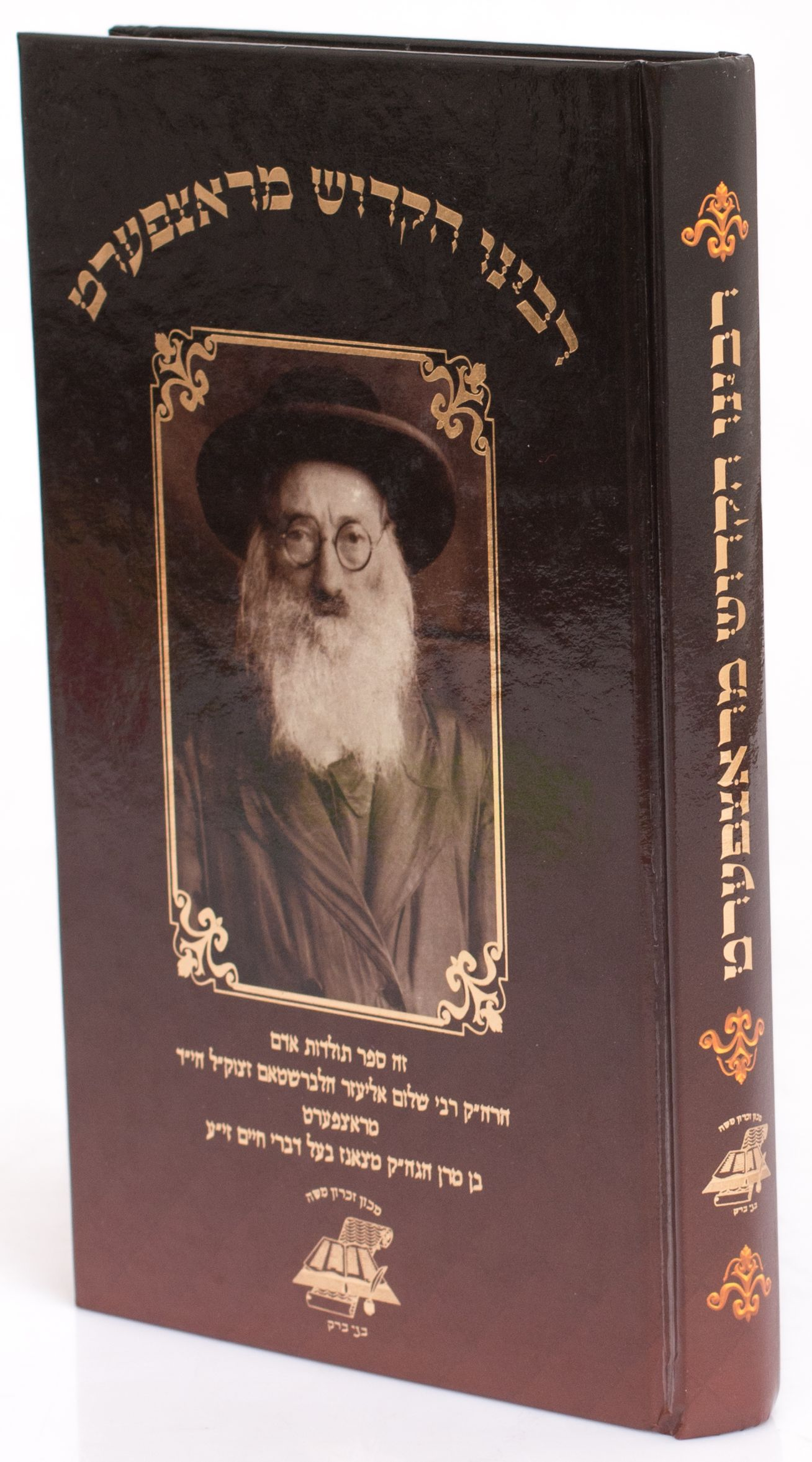 תמונת הרב הקדוש רבי שלום אליעזר הלברשטאם זצ"ל הי"ד מראצפערט, בנו של ה"דברי חיים" מצאנז זי"ע